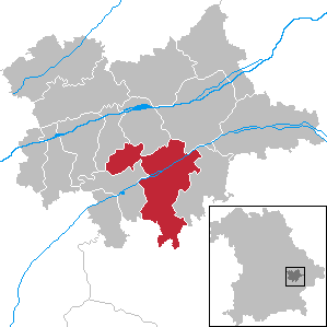 Reisbach in Bavaria - District Dingolfing-Landau